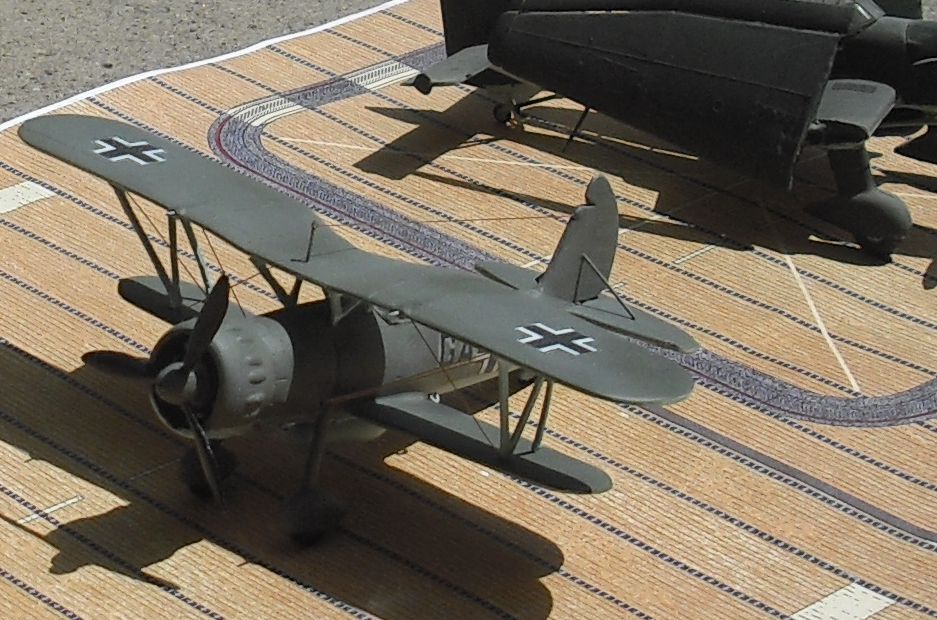 Arado 197 Modellbild mit Ju 87 C im Hintergrund.